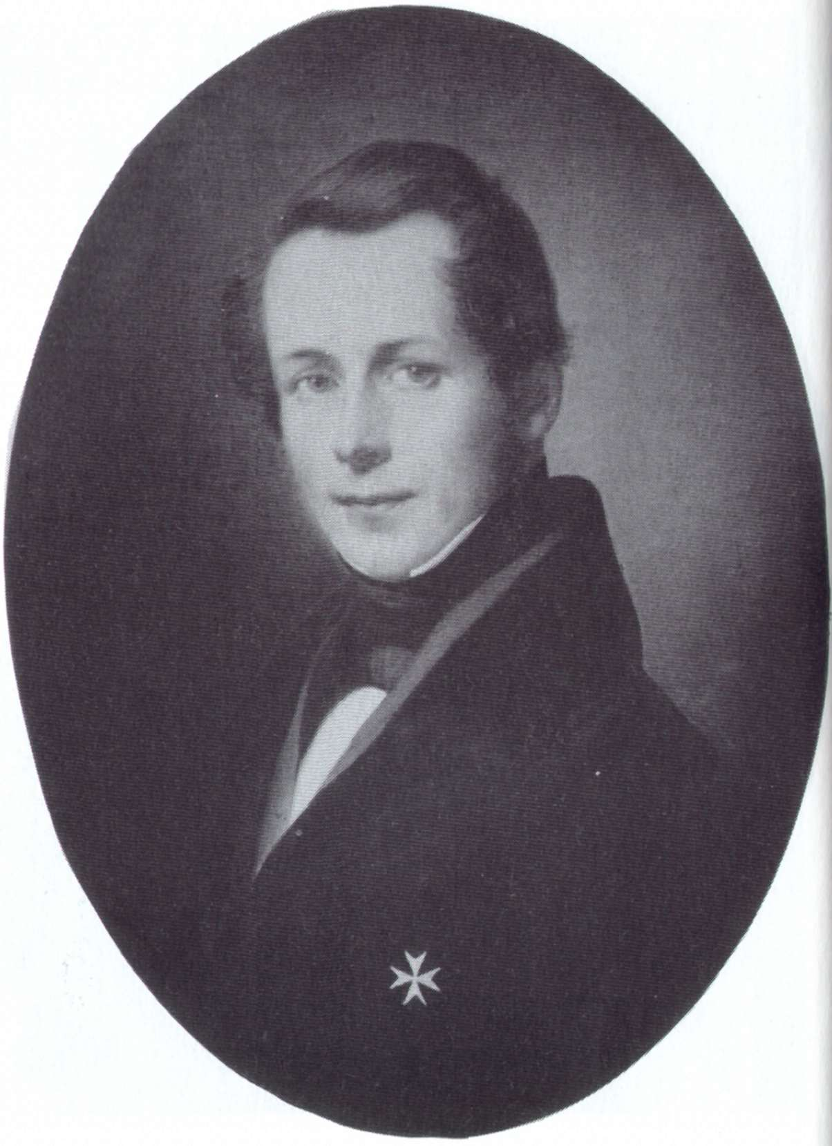 Josias Friedrich Ernst Freiherr von Heintze-Weissenrode (1800-1867), Danish-German civil servant